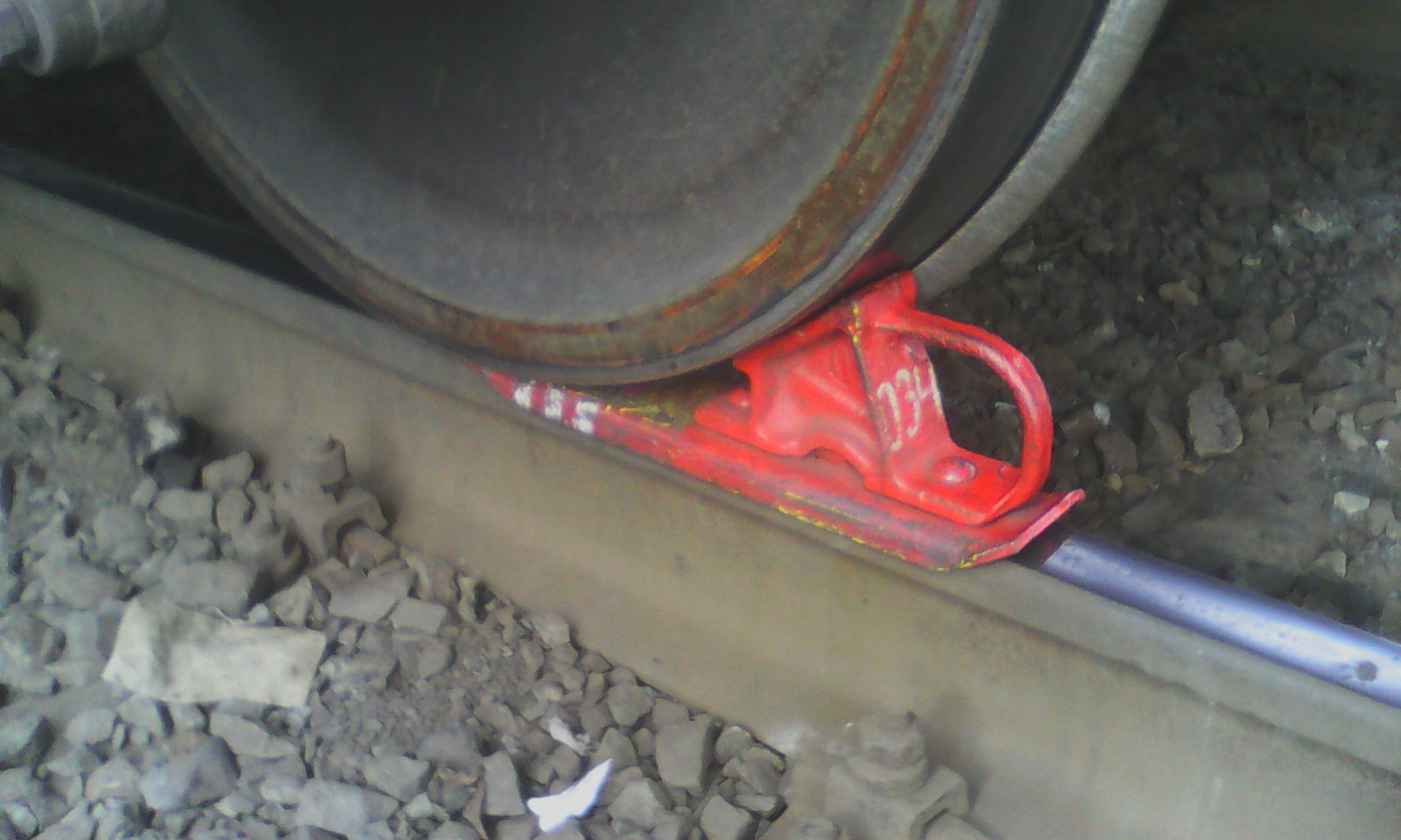 Тормозной башмак установленный с накатом. ЮУЖД, станция Металлургическая